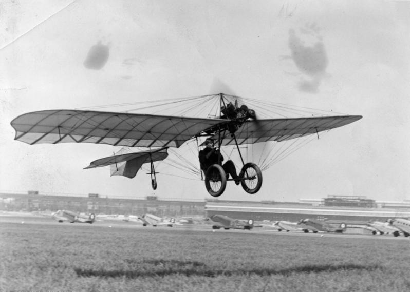 Der Geburtstagsflug eines 60-jährigen Flugpioniers Der bekannte Flugpionier Hans Grade, welcher am 17. Mai 1939 seinen 60jährigen Geburtstag feiert, flog an seinem Ehrentage ein noch in seinem Besitz befindliches Original-Flugzeug aus dem Jahre 1909 also jetzt 30 Jahre alt, auf dem Berliner Flughafen Tempelhof. Wenn der Geburtstagflug auch nicht mehr wie 550 Meter betrug, so staunten doch die Flugkapitäne unserer Grossen Lufthansaflugzeuge, was so eine alte "Kiste" und so ein "Alter Knochen" noch zu leisten vermag. Bild 1.: Der 60-jährige Flugpionier Hans Grade bei seinem Geburtstagsflug mit einer Maschine aus dem Jahre 1909 auf dem Berliner Zentralflughafen. (Anmerkung der Schriftleitung. Die Aufnahmen wurden Sonntag den 14.5.1939 gemacht, da an einem Wochentage es der Betrieb auf dem Flughafen nicht zulässt).